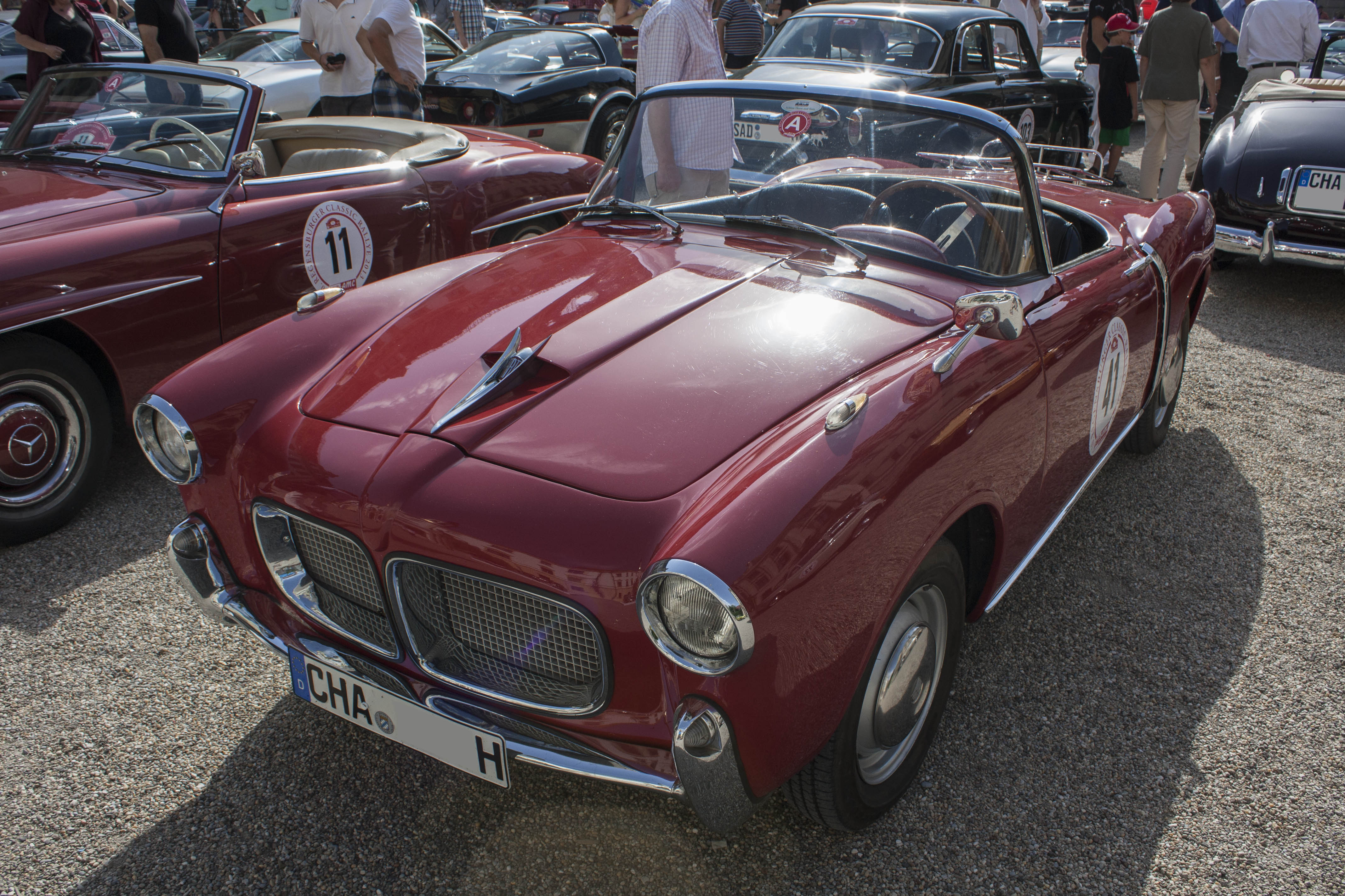 Fiat 1100-103 TV Trasformabile (Bj. 1953-1955)